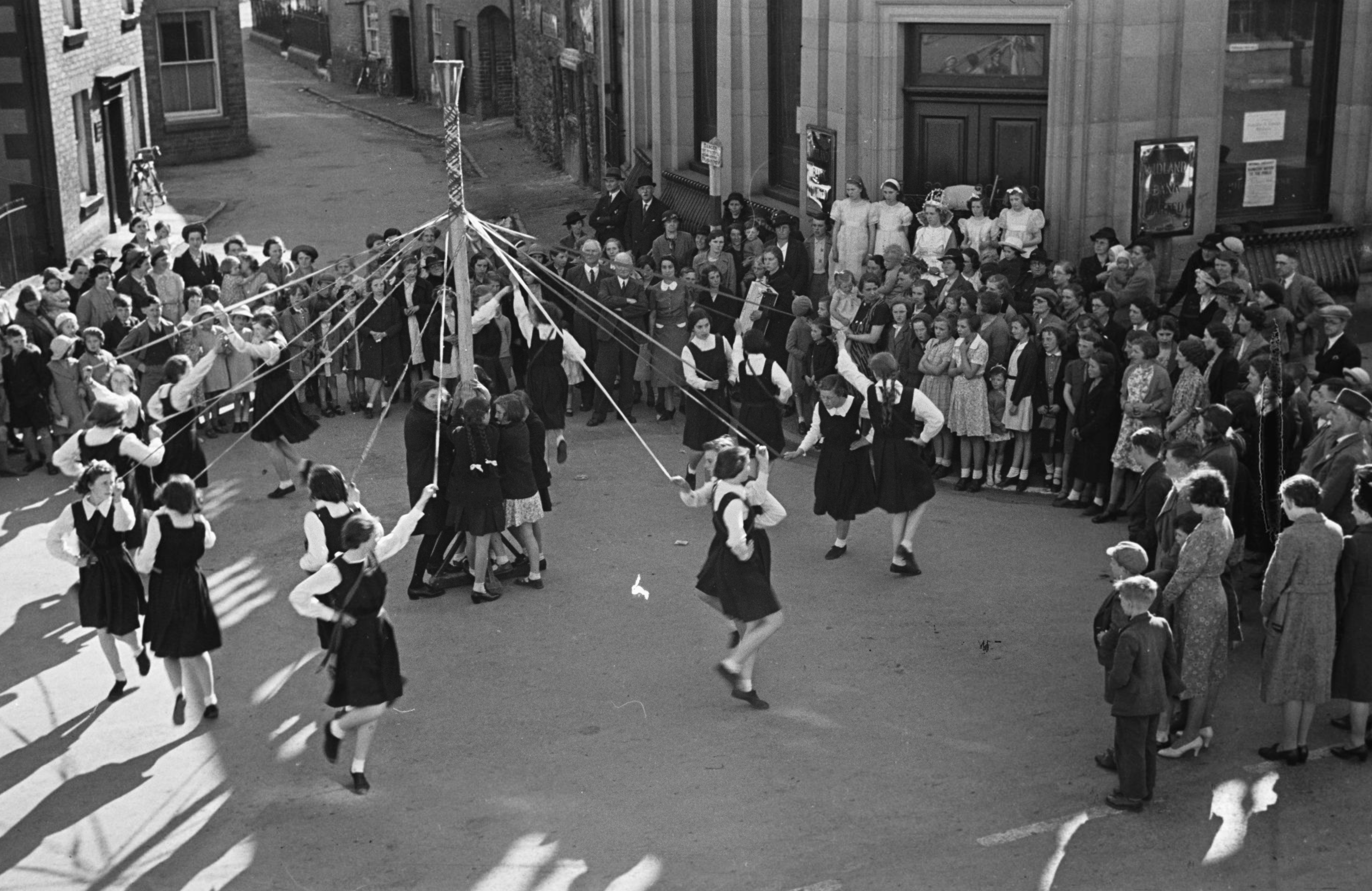 Teitl Cymraeg/Welsh title: Carnifal a bedwen Fai Llanfyllin Ffotograffydd/Photographer: Geoff Charles (1909-2002) Dyddiad/Date: May 1, 1941 Cyfrwng/Medium: Negydd ffilm / Film negative Cyfeiriad/Reference: (gcc09214) Rhif cofnod / Record no.: 3473127 Rhagor o wybodaeth am gasgliad Geoff Charles yn Llyfrgell Genedlaethol Cymru More information about the Geoff Charles Collection at the National Library of Wales Mae ffotograffau Geoff Charles hefyd yn rhan o Broject Europeana Libraries Geoff Charles' photographs also form part of the Europeana Libraries Project